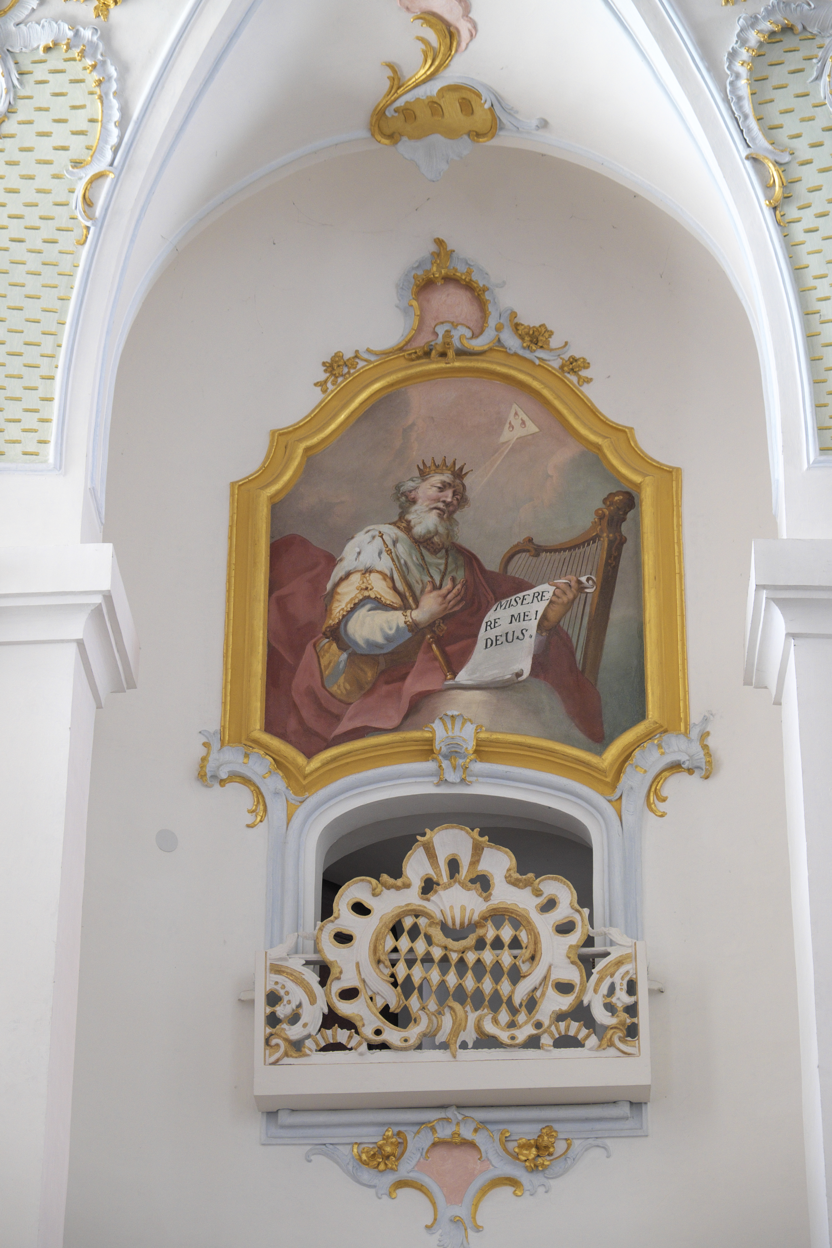 Katholische Pfarr- und Klosterkirche St. Alto und St. Birgitta in Altomünster im Landkreis Dachau (Bayern), Gemälde im Beichtraum, Darstellung: König David